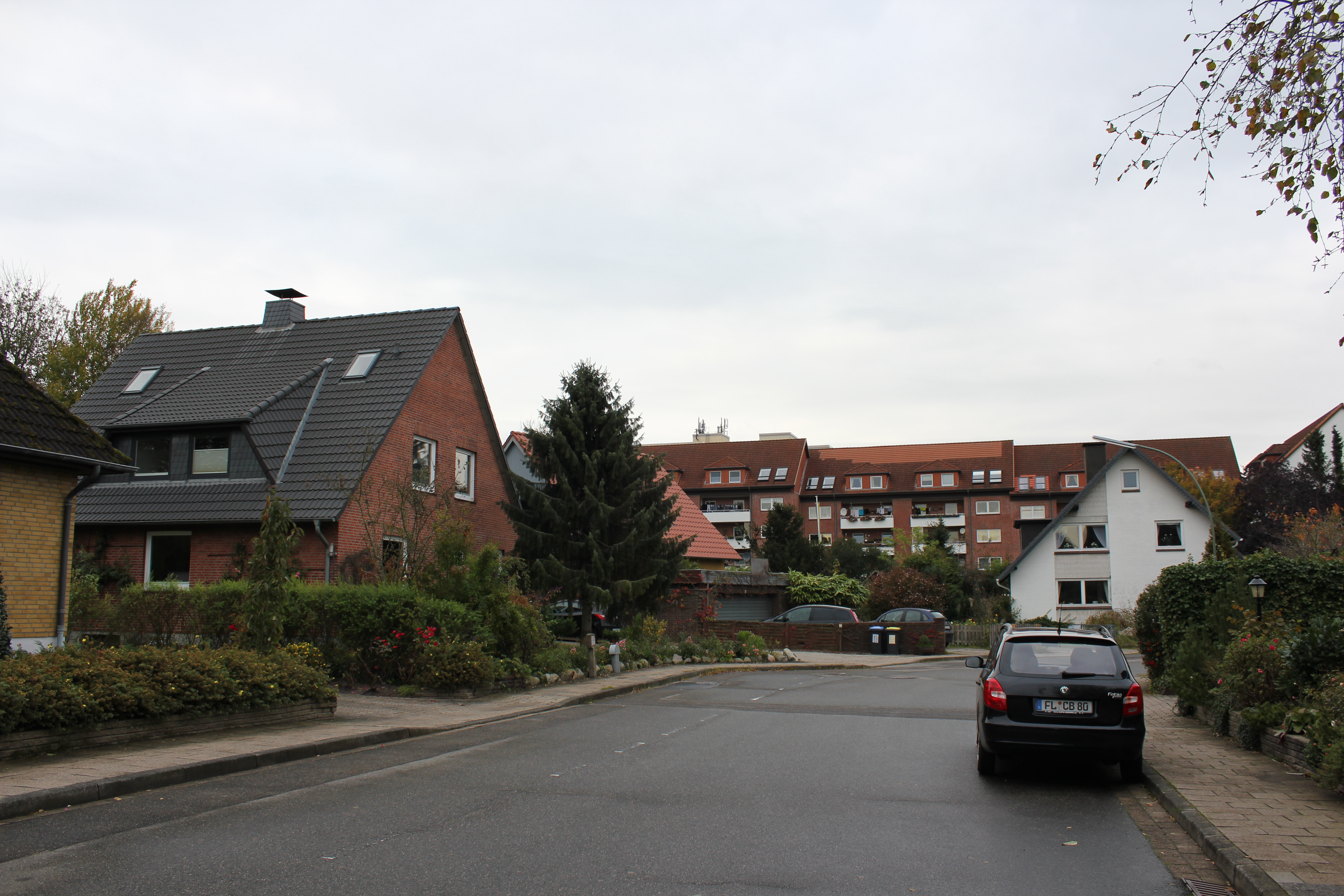 Kleiner Wachholderbogen mit Blick Richtung Osterkoppel (Flensburg-Mürwik), Bild 02